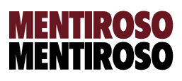 título en español para la película "Liar Liar", dado en hispanoamérica.